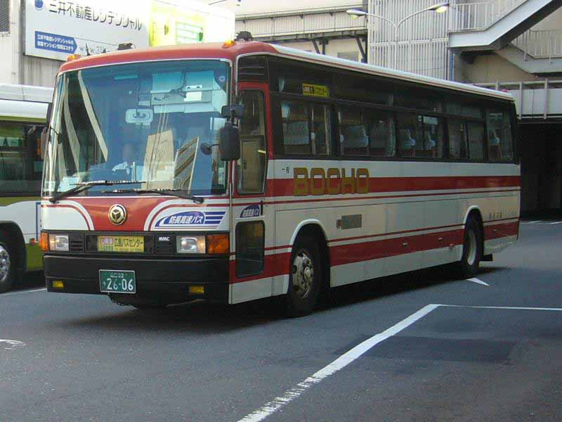 登録番号 山口22う26-06 防長交通平生営業所所属 元・山口市営バス所属 高速用車両、元貸切車 2007年10月21日 広島バスセンターにて撮影